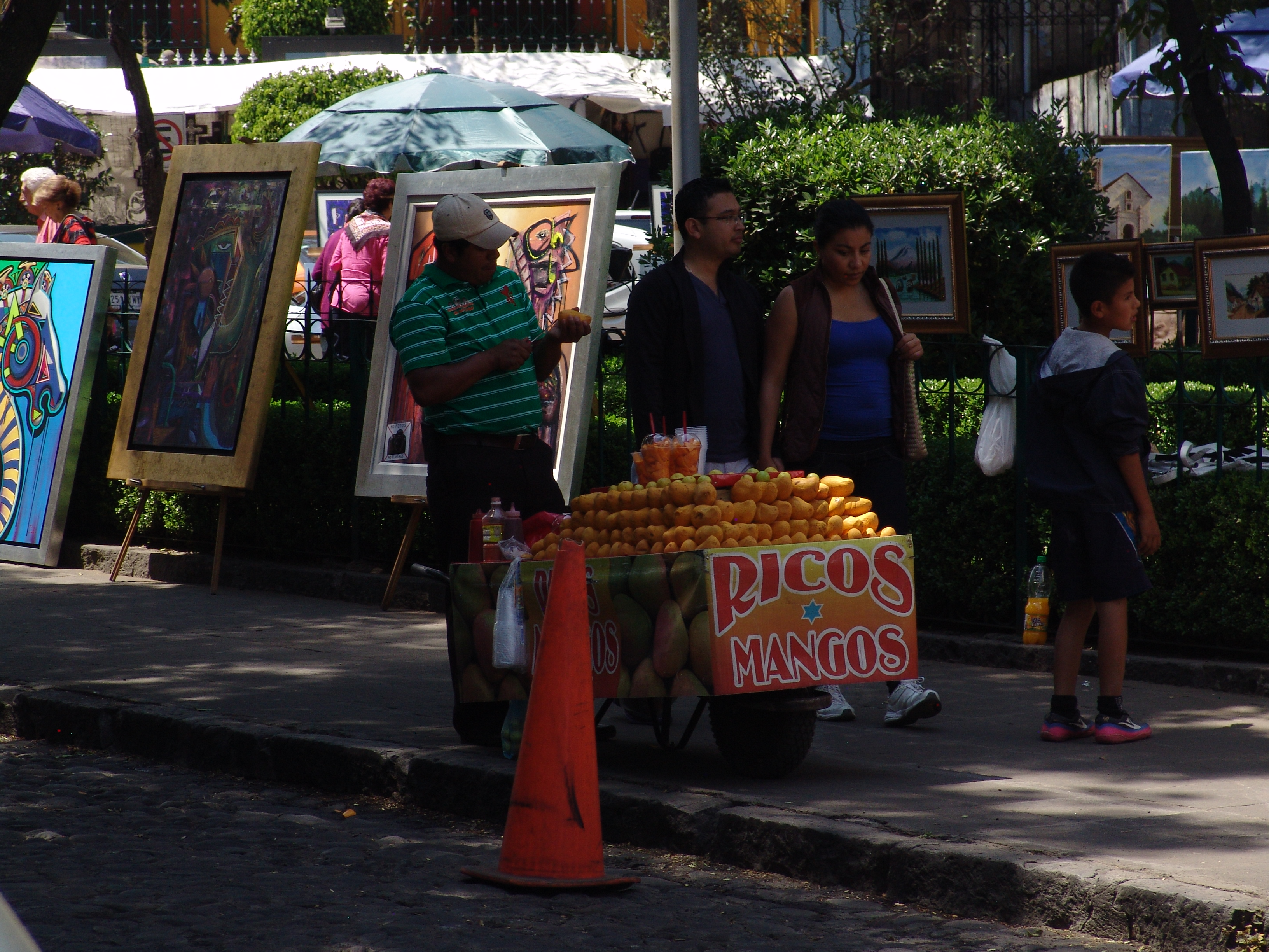 Fotografías del "Bazar del Sábado". Distrito Federal, Colonia San Ángel, Álvaro Obregón.